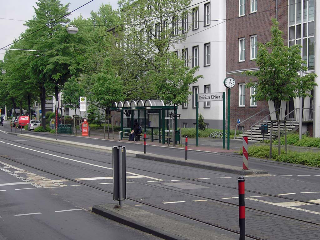 Straßenbahnhaltestelle LVR-Klinik (zum Zeitpunkt der Aufnahme Rheinische Kliniken), Bonn-Castell; rechts das Gebäude des Instituts für Psychologie der Rheinischen Friedrich-Wilhelms-Universität Bonn